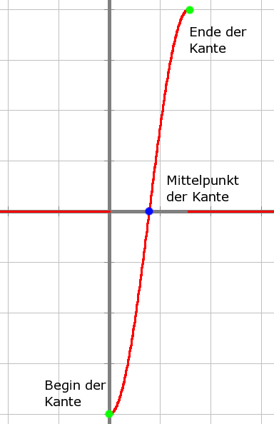 Zum Bild Kante mit 2 Knicken.png zugehörige 2.Ableitung